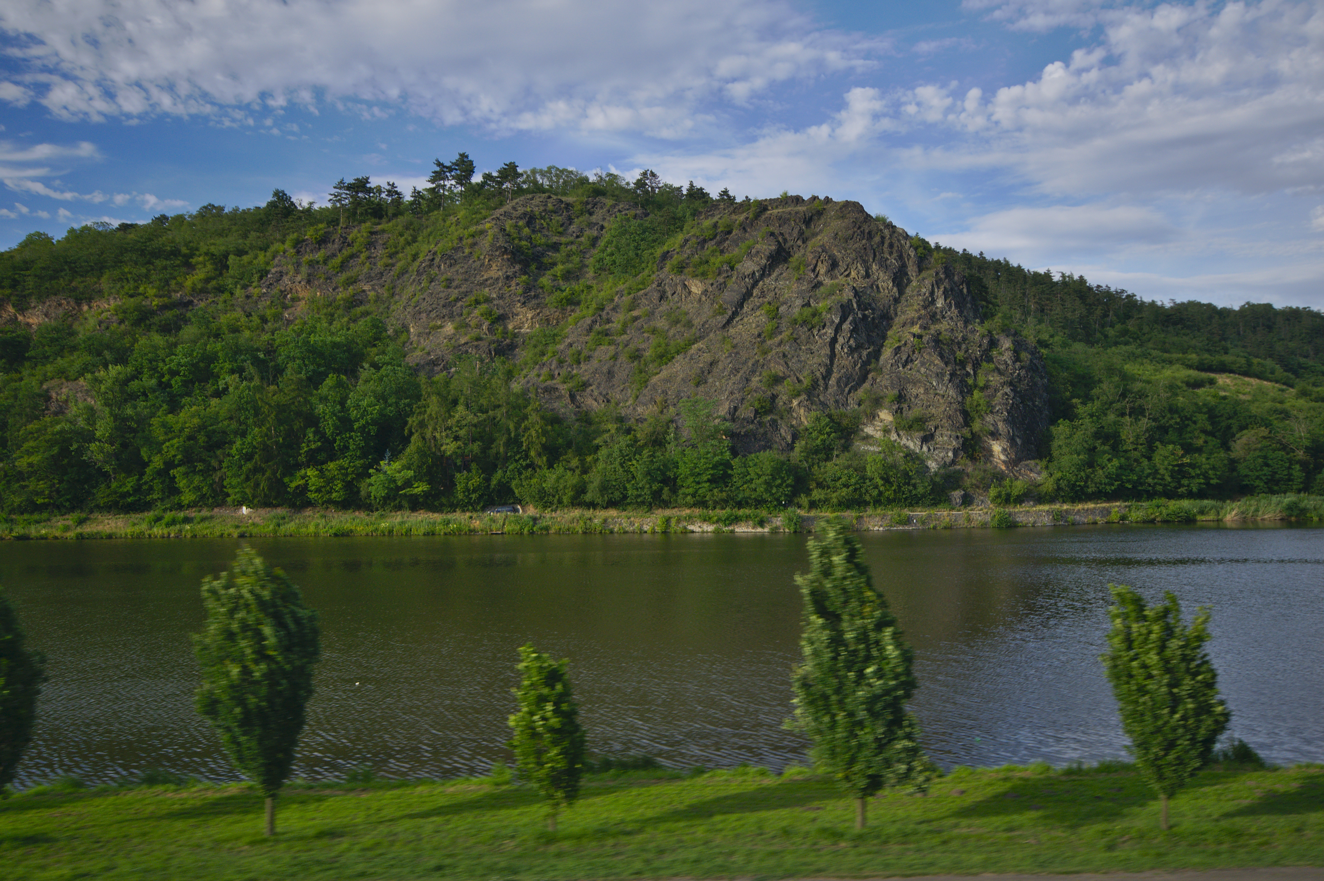 Přírodní rezervace Máslovická stráň, okres Praha-východ